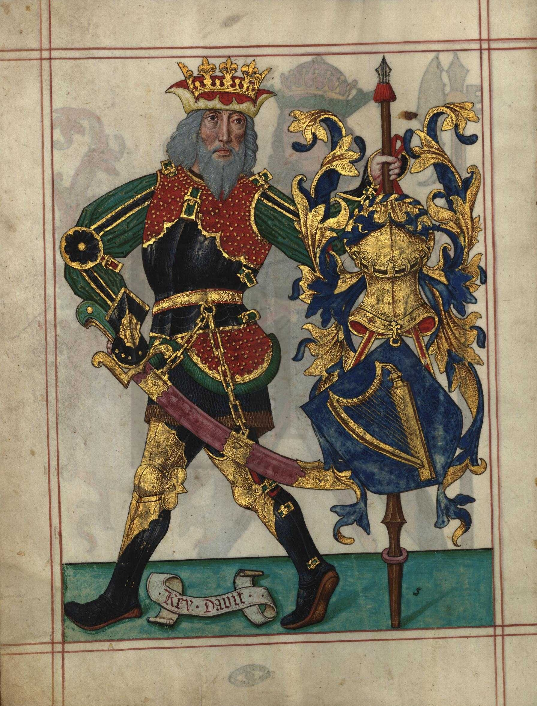 Livro do Armeiro-Mor, armas do Rei David (fl 1v)